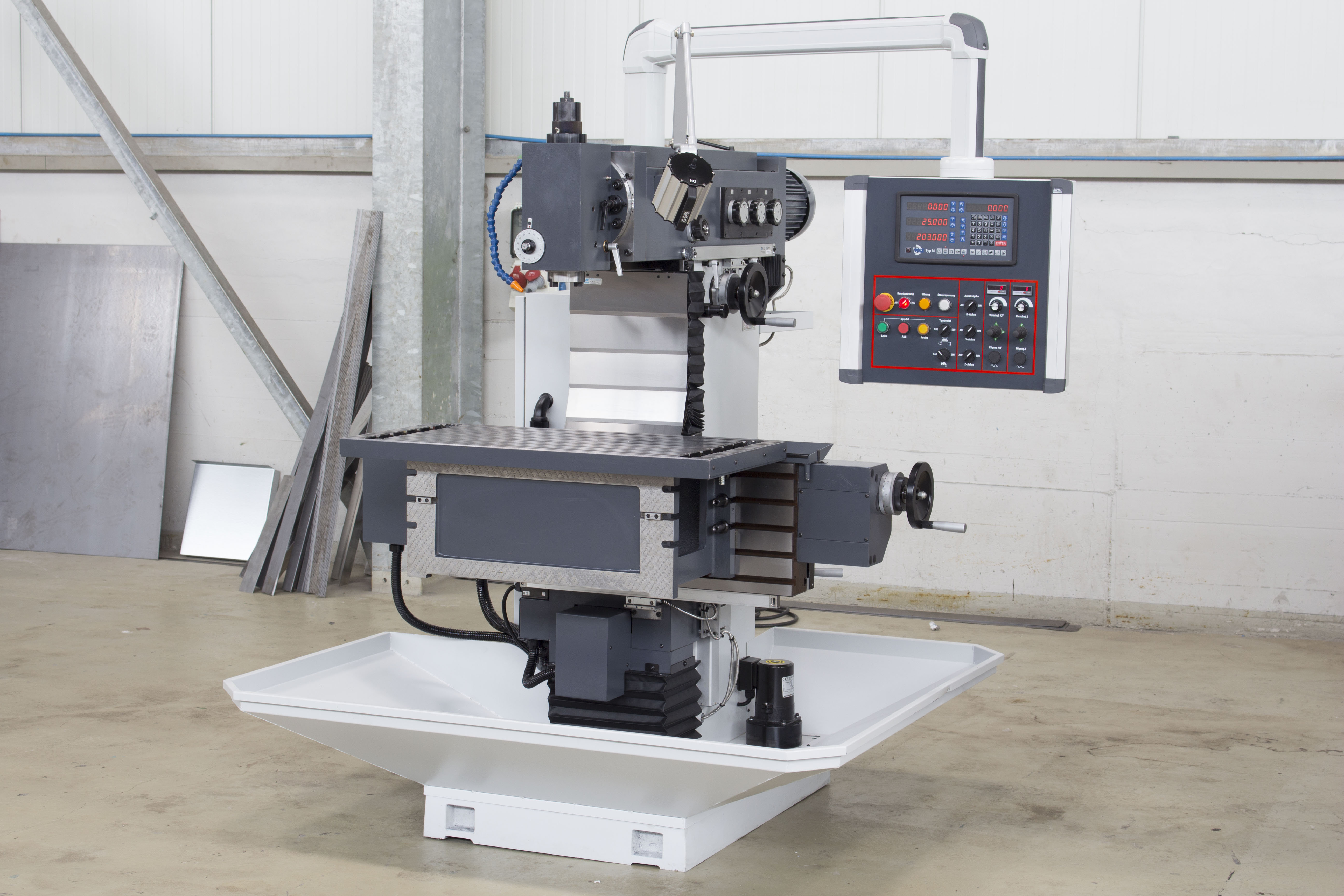 Das Bild zeigt eine Werkzeugfräsmaschine - VOLZ FUS 32 und wurde im Zuge eines Firmenbesuchs bei der Firma VOLZ Werkzeugmaschinen GmbH & Co. KG in Witten fotografiert.